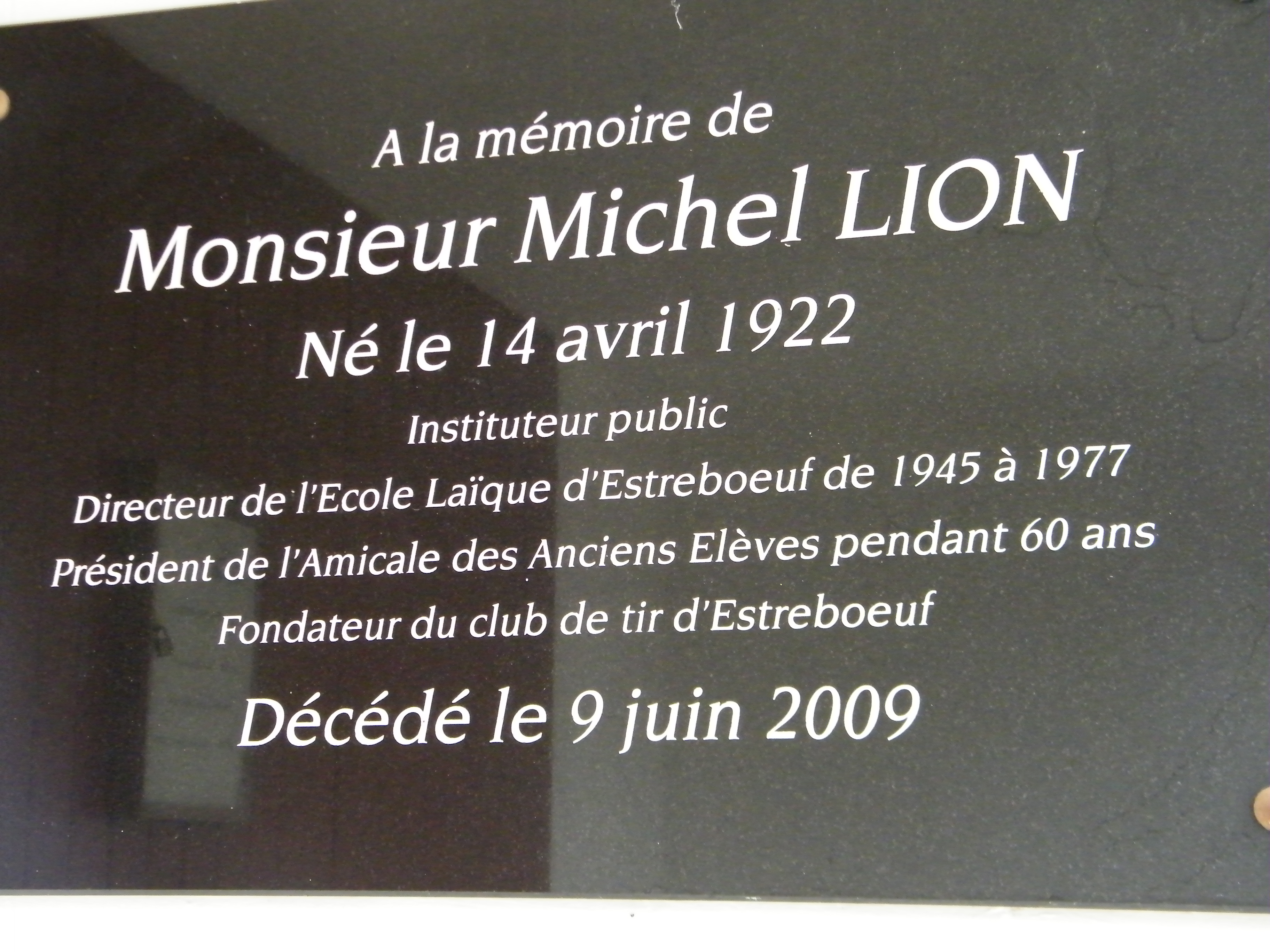 Hommage à Michel Lion, Estréboeuf, Somme, France